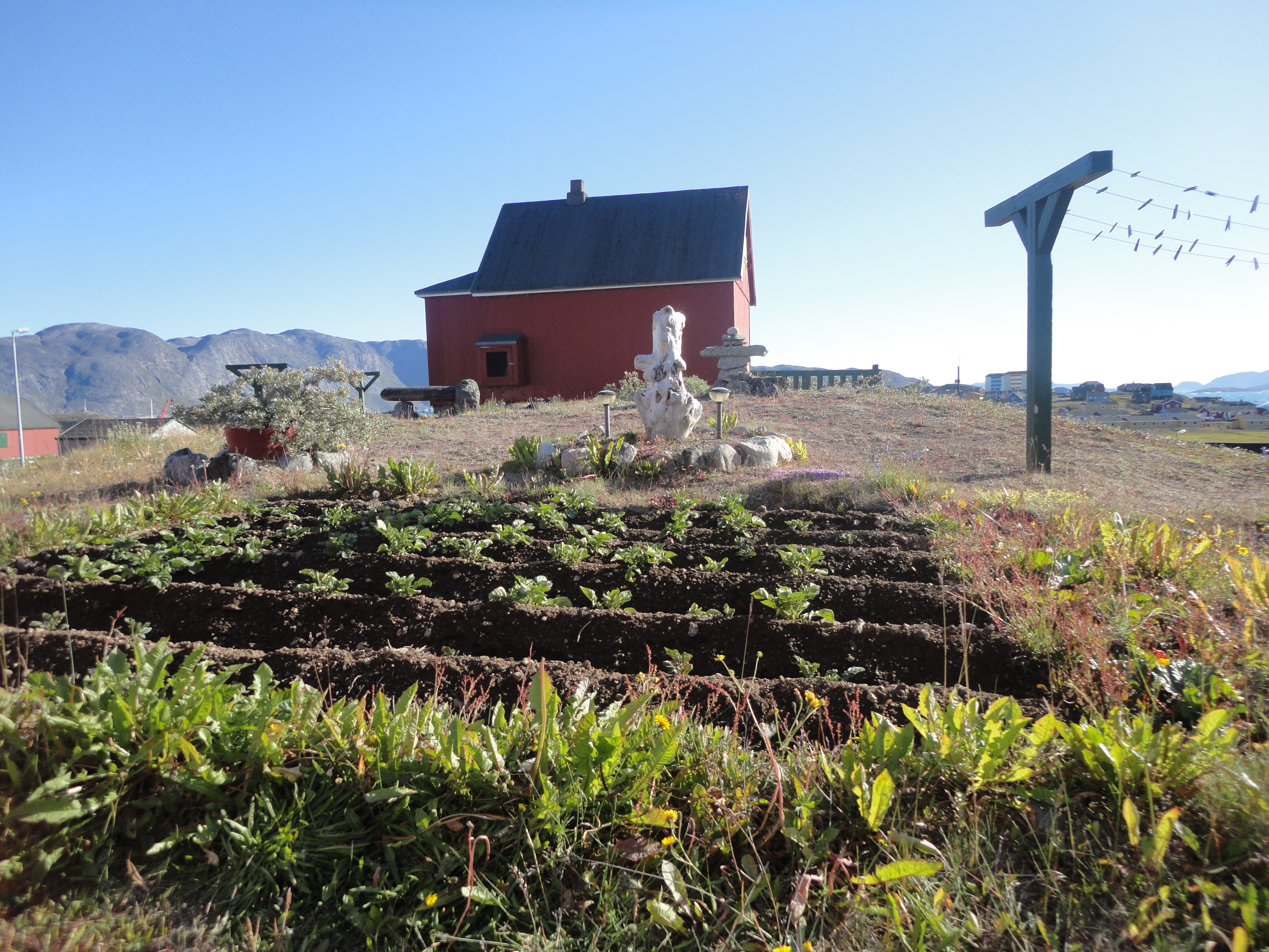 נארסאק